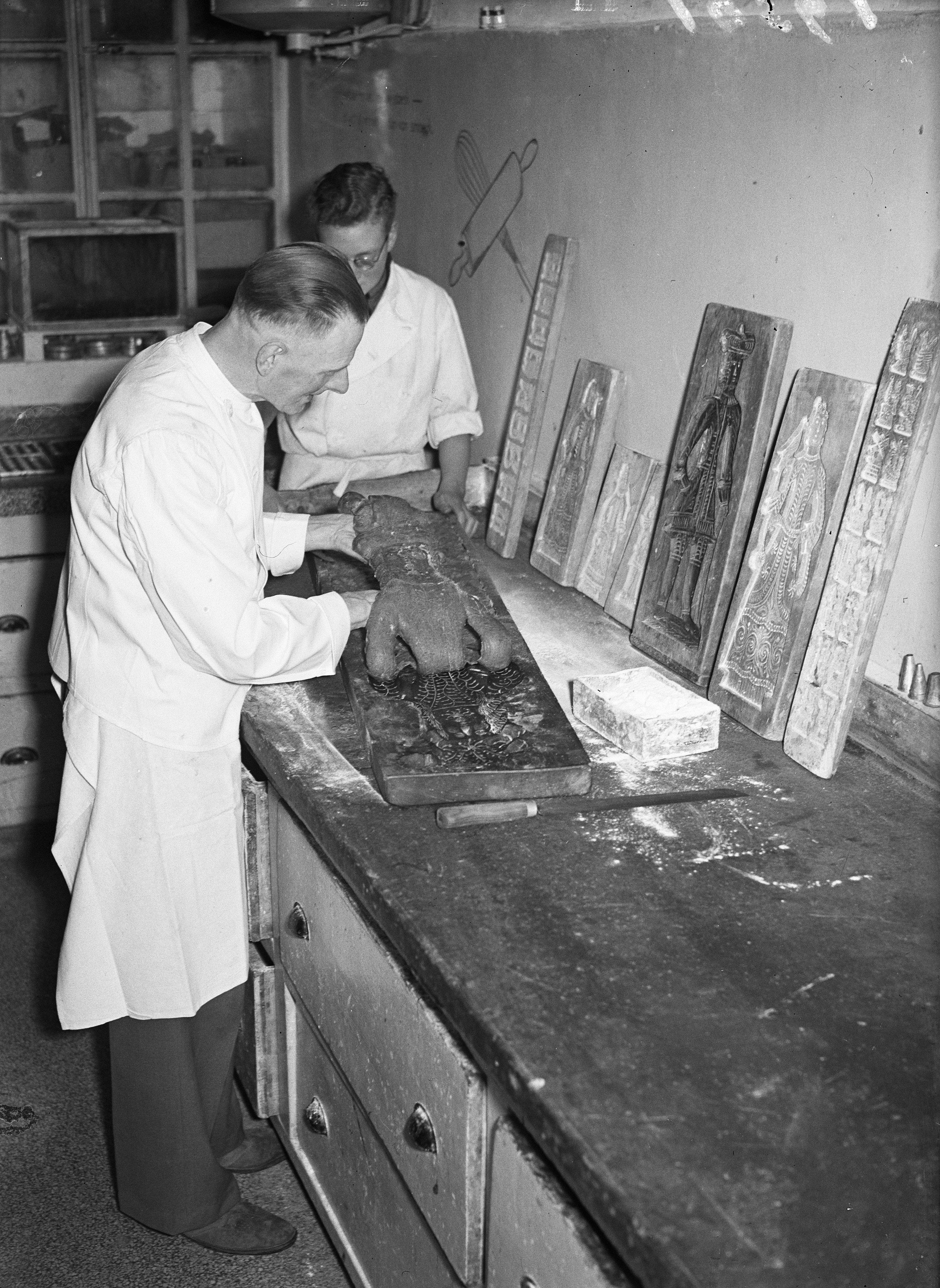 Collectie / Archief : Fotocollectie Anefo Reportage / Serie : [ onbekend ] Beschrijving : Speculaas bakken Datum : 15 november 1946 Trefwoorden : banketbakkers, voedselvoorziening Fotograaf : Sagers, Harry / Anefo Auteursrechthebbende : Nationaal Archief Materiaalsoort : Glasnegatief Nummer archiefinventaris : bekijk toegang 2.24.01.09 Bestanddeelnummer : 901-9561